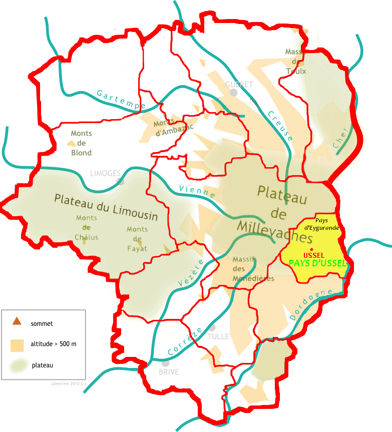 Pays d'Ussel sur la carte des pays traditionnels du limousin